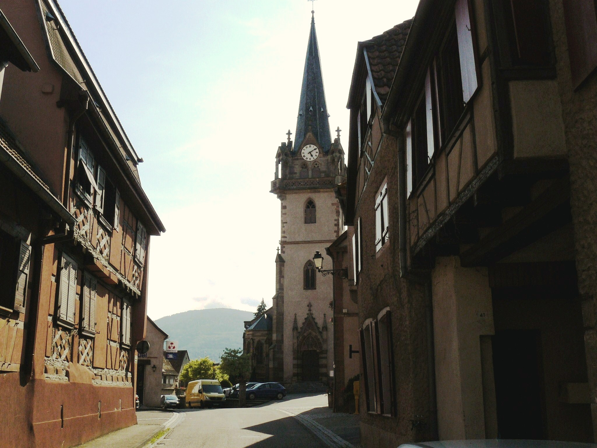 Le centre du village et l'église de Bernardswiller